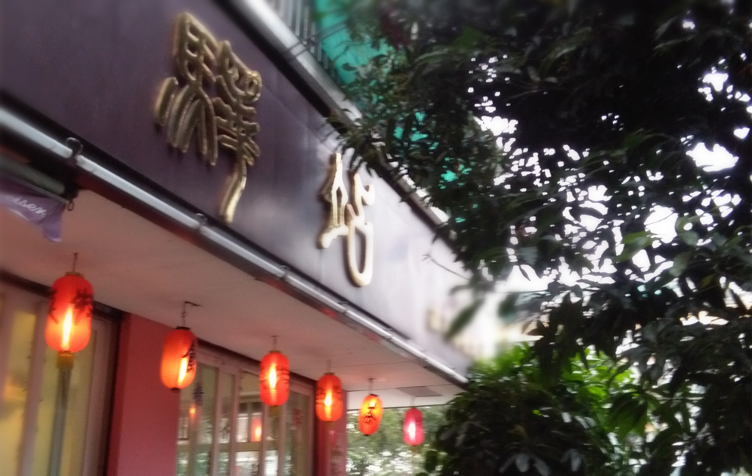 小篆體的店鋪招牌。攝於中國大陸